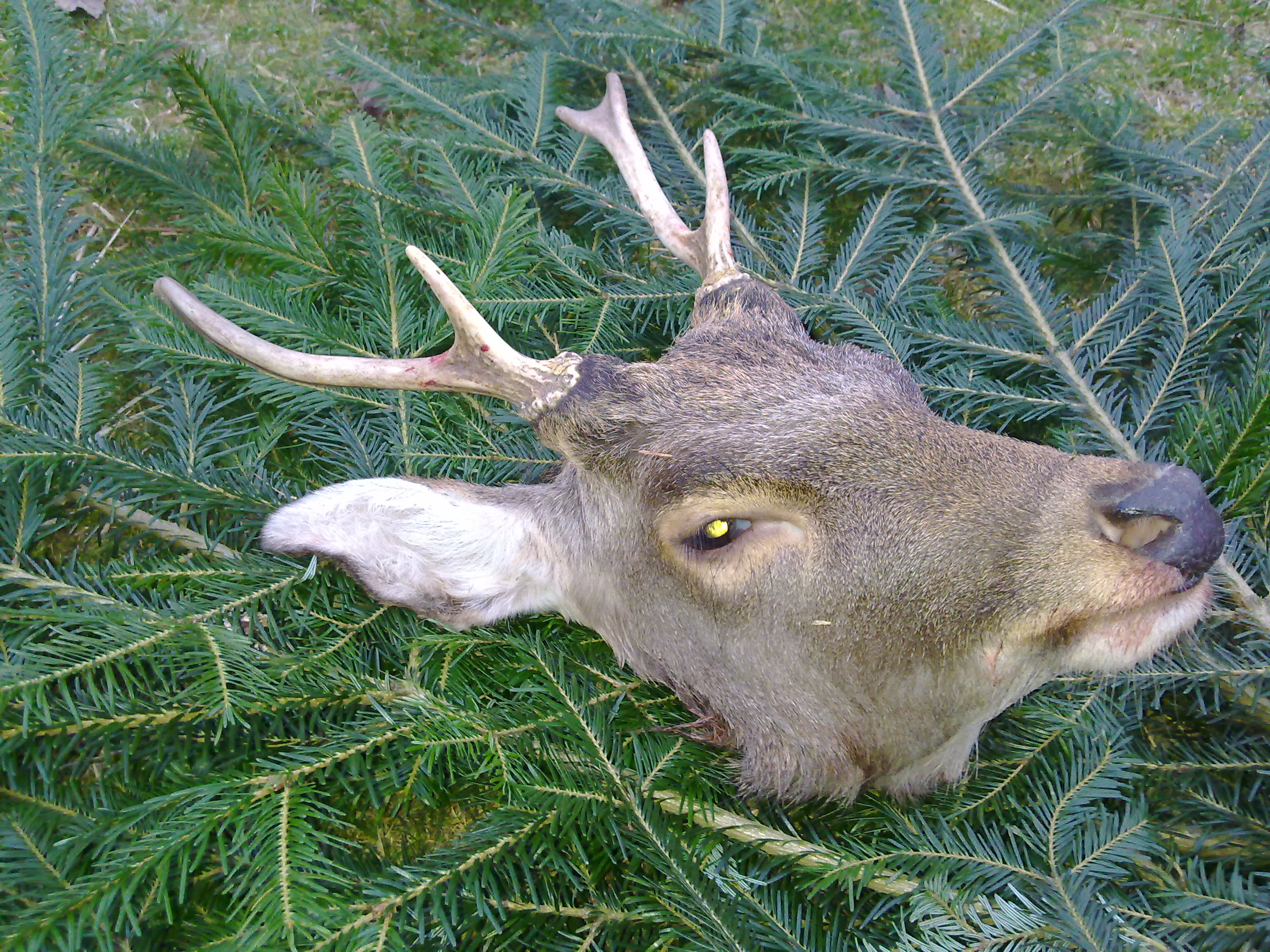 trofej jelene siky